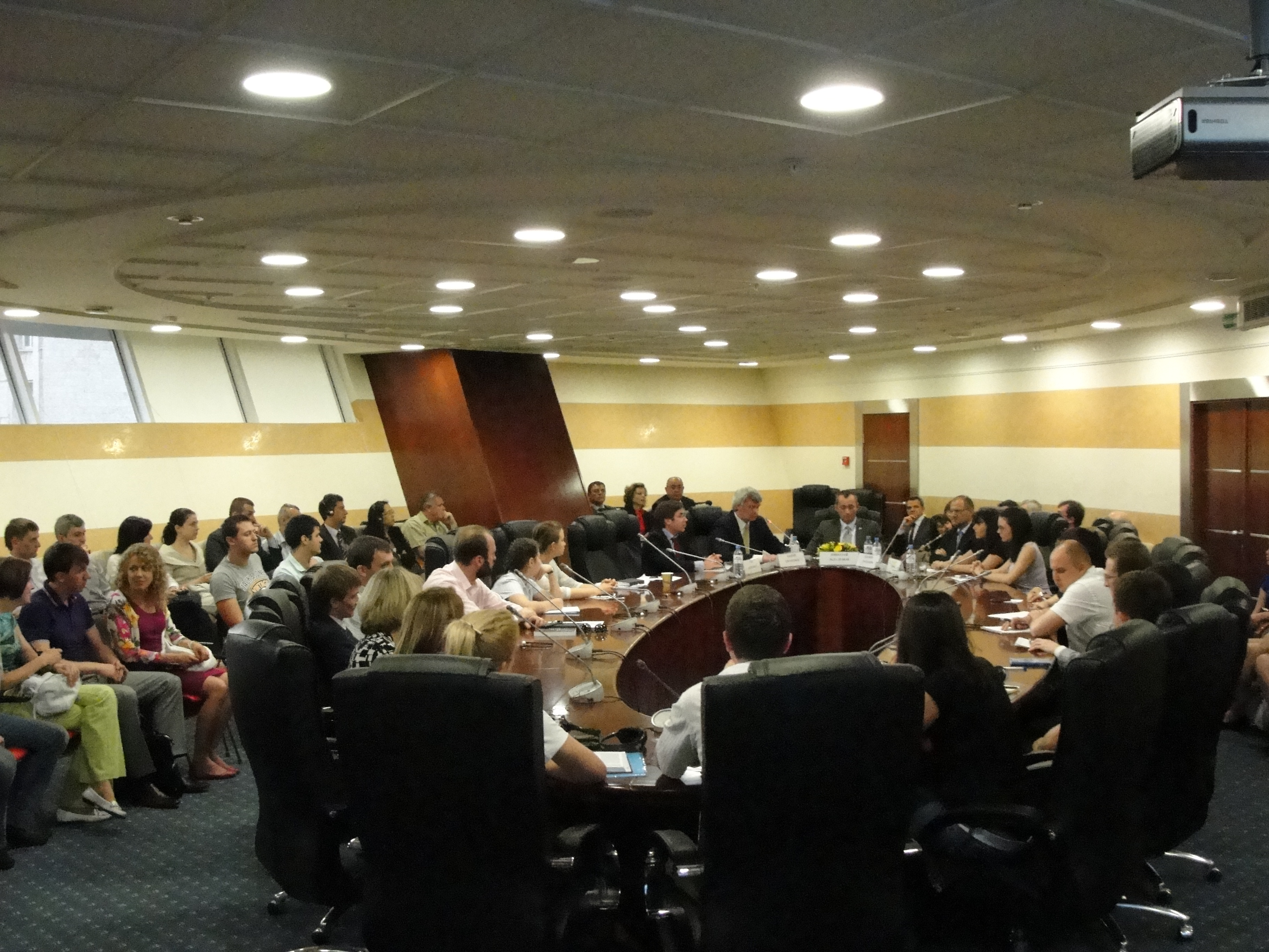 Среща на министър Младенов в Московския държавен институт за международни отношения